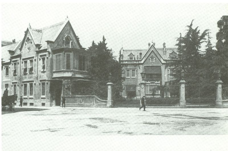 Il villino Borghi a Milano, in via Principe Umberto (oggi via Turati) angolo via della Moscova. Fu demolito nel 1919 per costruire la cosiddetta "Cà Brutta".